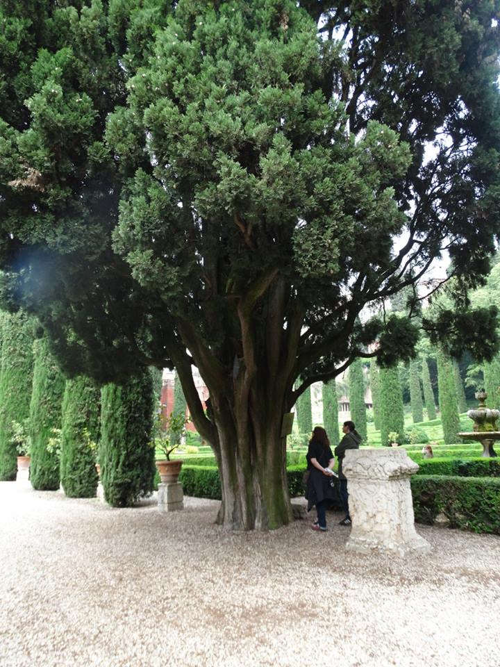 Cipresso di Gothe.